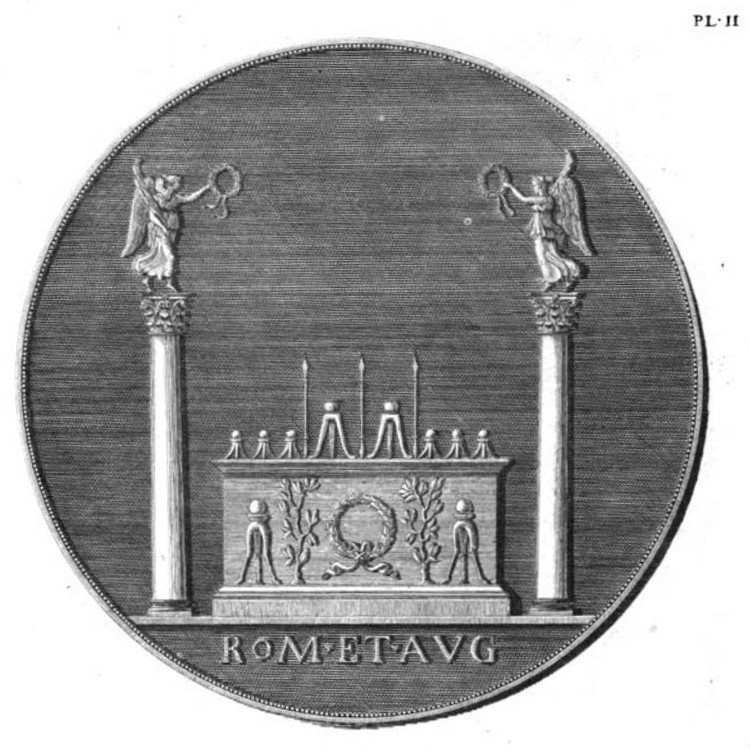 Médaille de l'Autel des Gaules